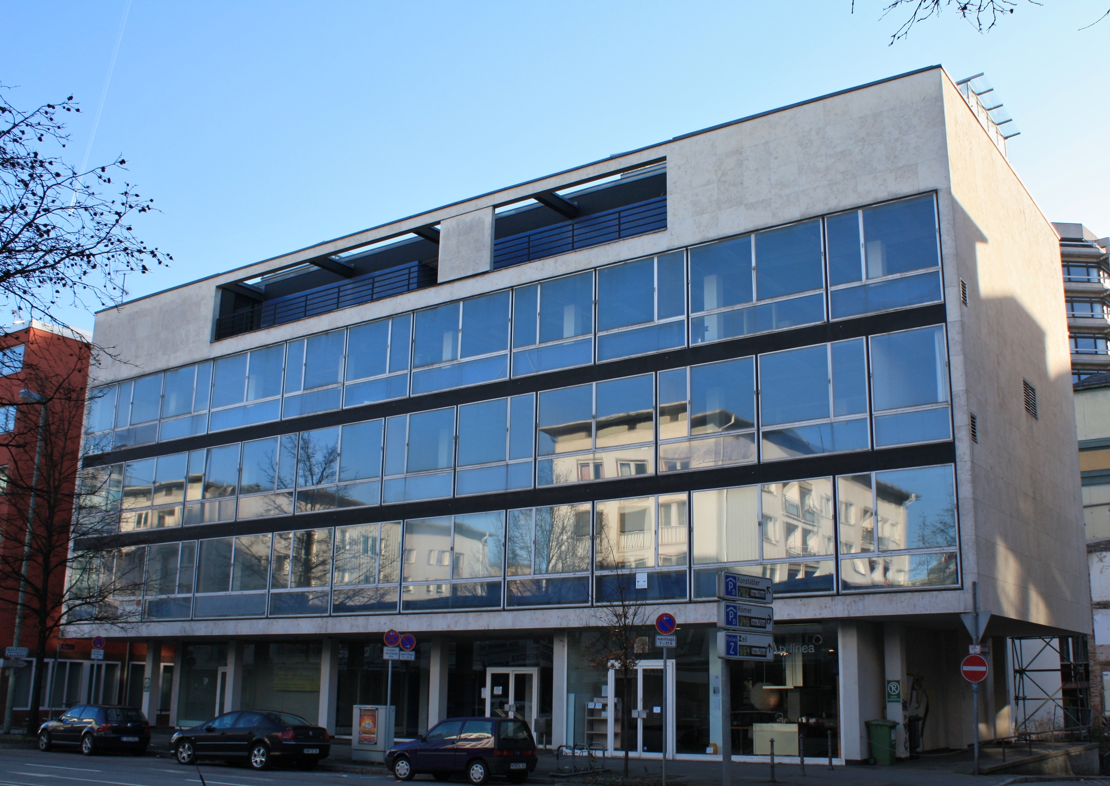 Berliner Straße 27, Frankfurt am Main, in den 1950er-Jahren nach Plänen des Architekten Otto Apel gebaut.